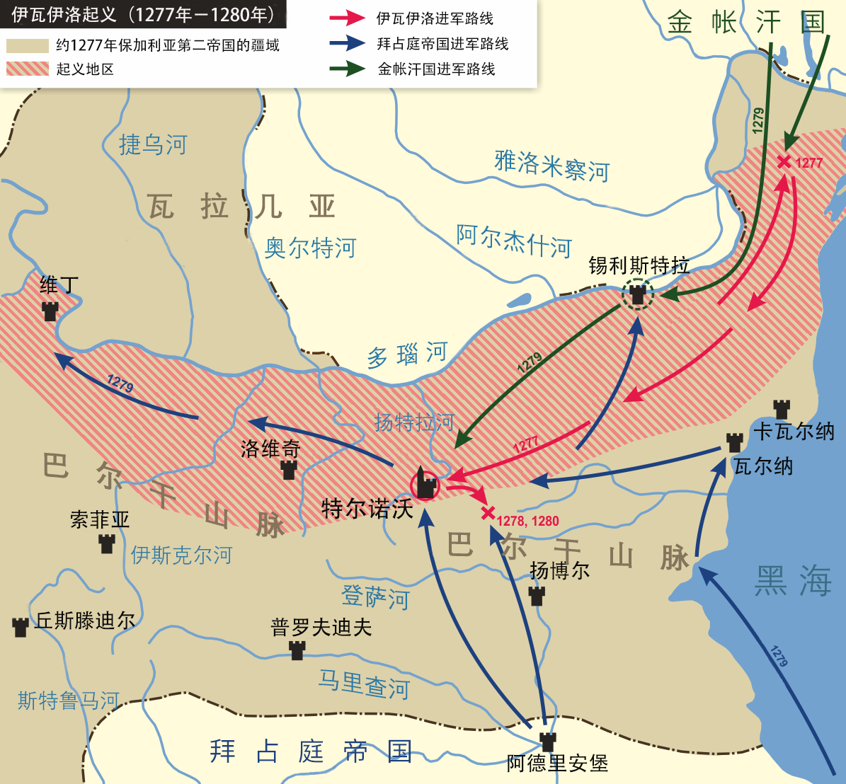 中文（中国大陆）: 伊瓦伊洛起义局势